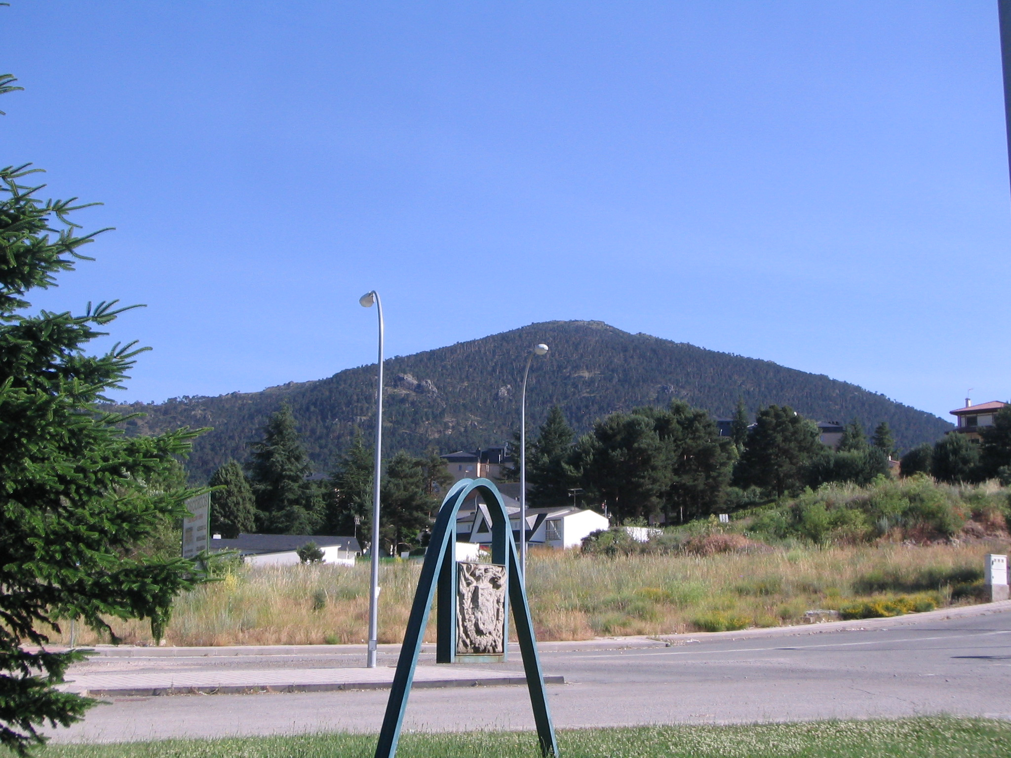 Monte Cueva Valiente, El Espinar, Segovia (España)